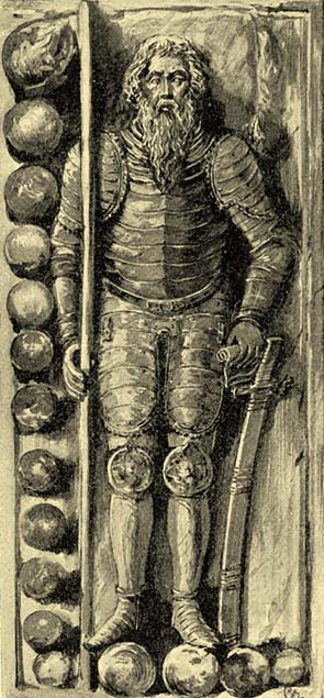 Dobó István. Vörös márvány dombormű, mely egykor a hős dobóruszkai sirját jelölte, most az egri vár helyén van felállitva. Az eredetiről rajzolta Cserna Károly 1867 - 1944